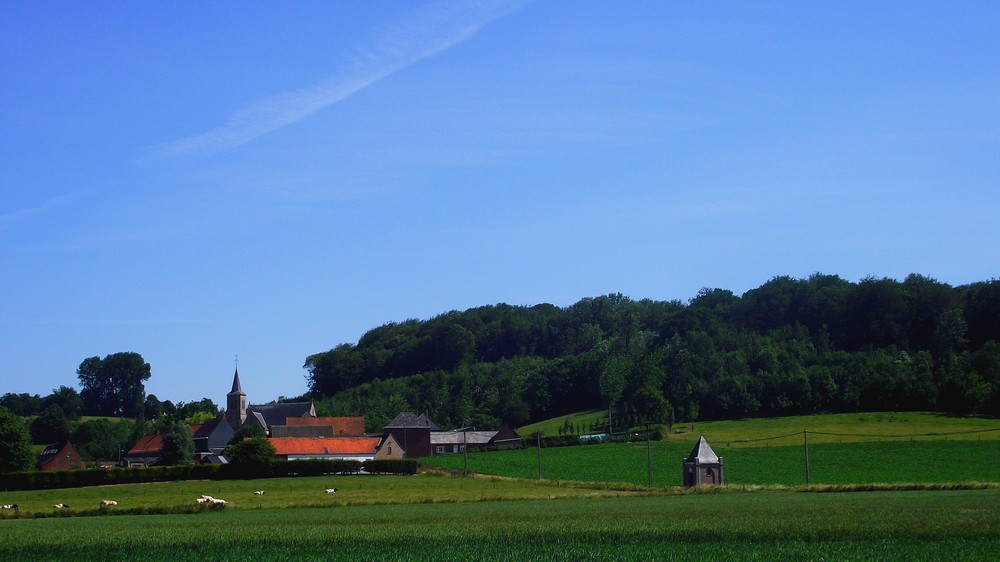 village de Montroeul au bois , Hainaut, Belgique